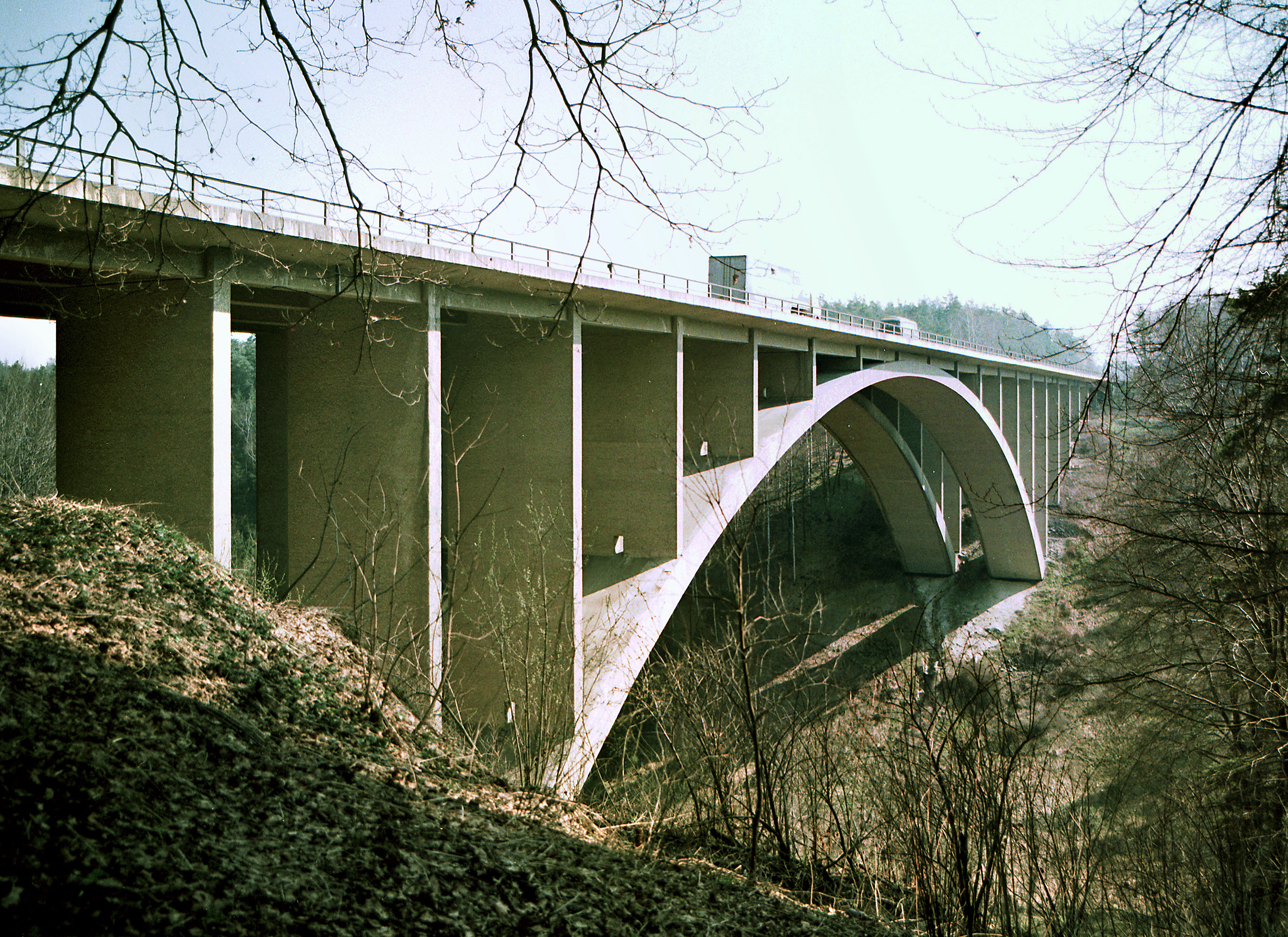 12.04.1988 DDR 6530 [07629] Hermsdorf Thür: Die Teufelstal-Autobahnbrücke der A4 (GMP: 50.877201,11.816985). Spannweite des Stahlbeton-Bogens 138 m. Erbaut von 1936 bis 1938. [R19880410D0009.TIF]1988041205NR.JPG(c)Blobelt